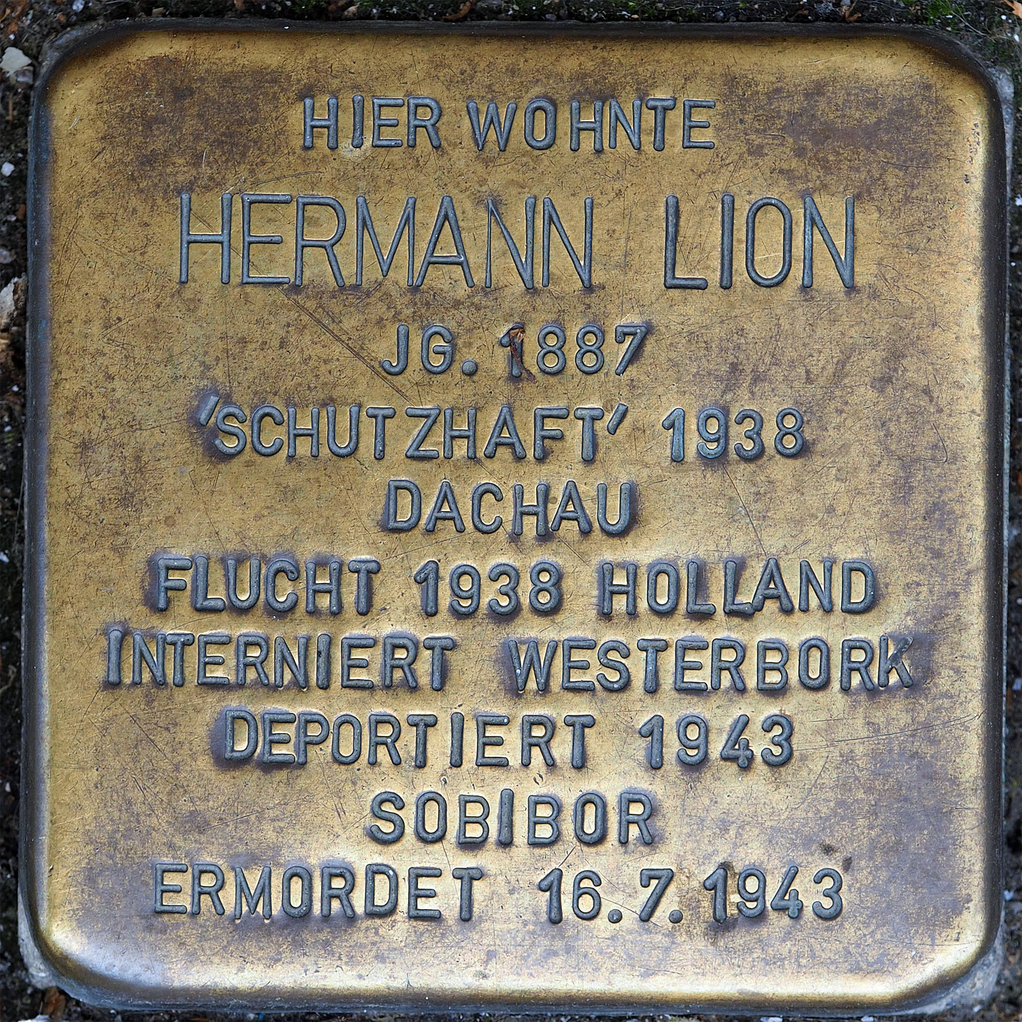 Stolpersteine Wesel: Lion, Hermann